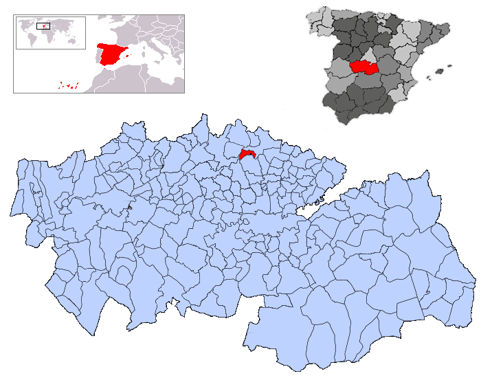 Las Ventas de Retamosa en la provincia de Toledo